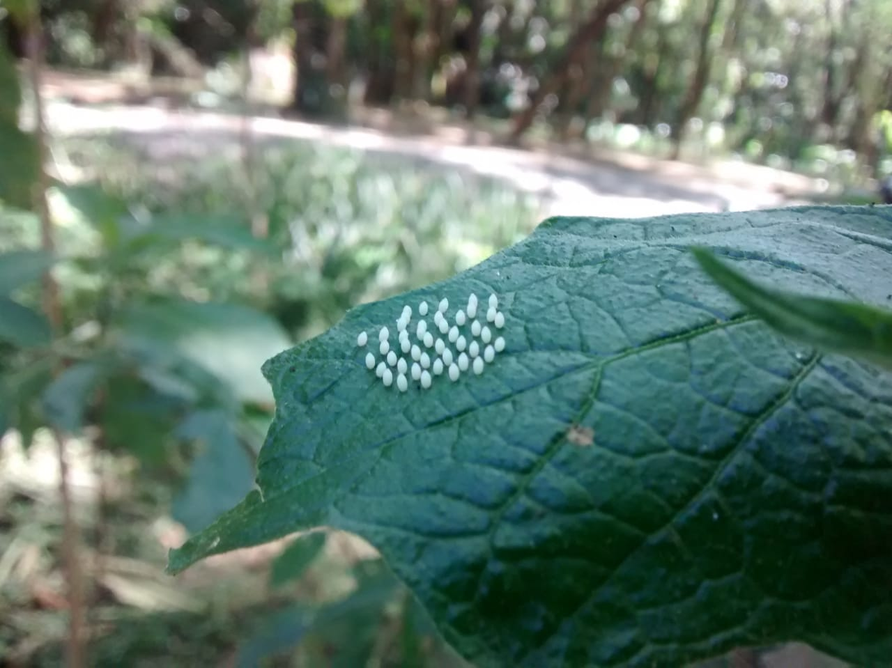 Foto de cluster de ovos de borboleta do gênero Mechanitis, registrada em 13/04/2018, em monitoramento feito na Cidade Universitária - USP - SP. Foto por: Juliana Lira. Picture of Mechanitis eggs cluster, taked on April, 13th, 2018, in a monitoring at Cidade Universitária - USP - SP. Picture taked by: Juliana Lira.